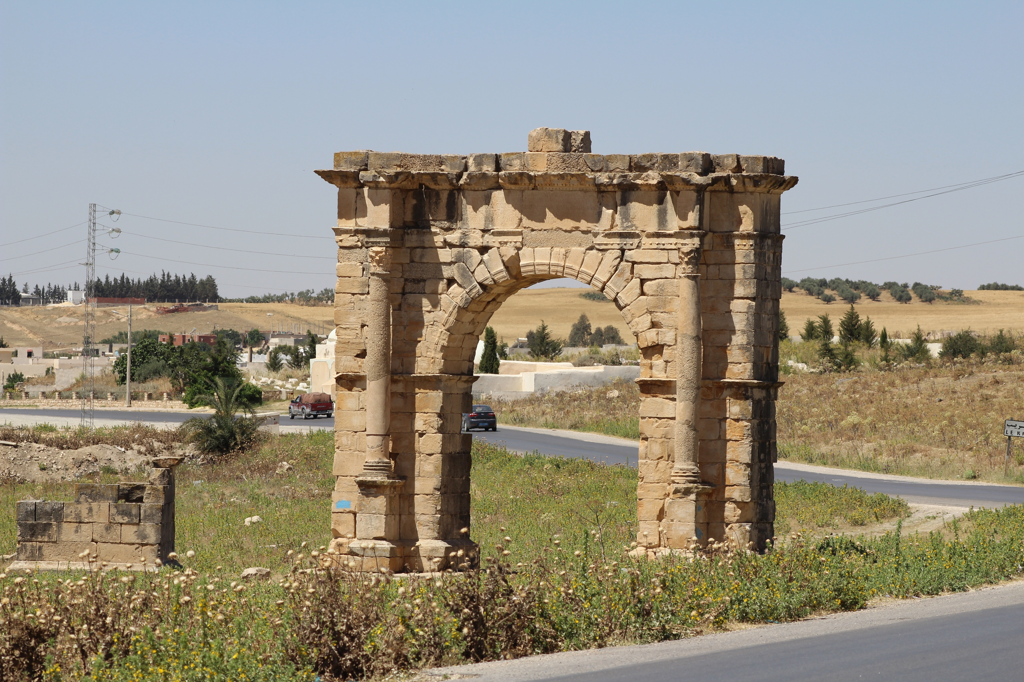 Arcs de Volsan